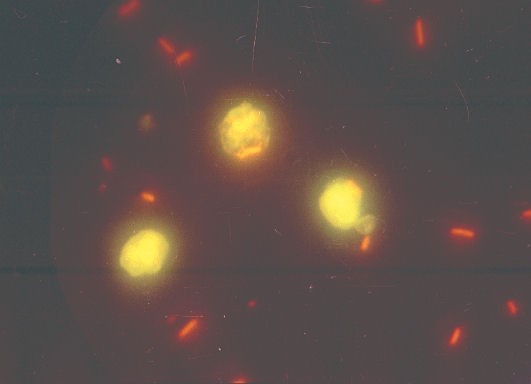 Leukozyten in Urin.Erythro-ung Bakterien-Phagozytos. Fluoreszenzmikroskopie,Acridinorange-Färbung